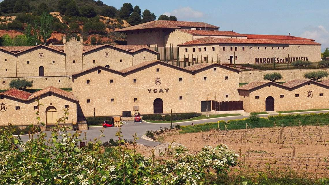 Bodegas Marques de Murrieta (Logroño)